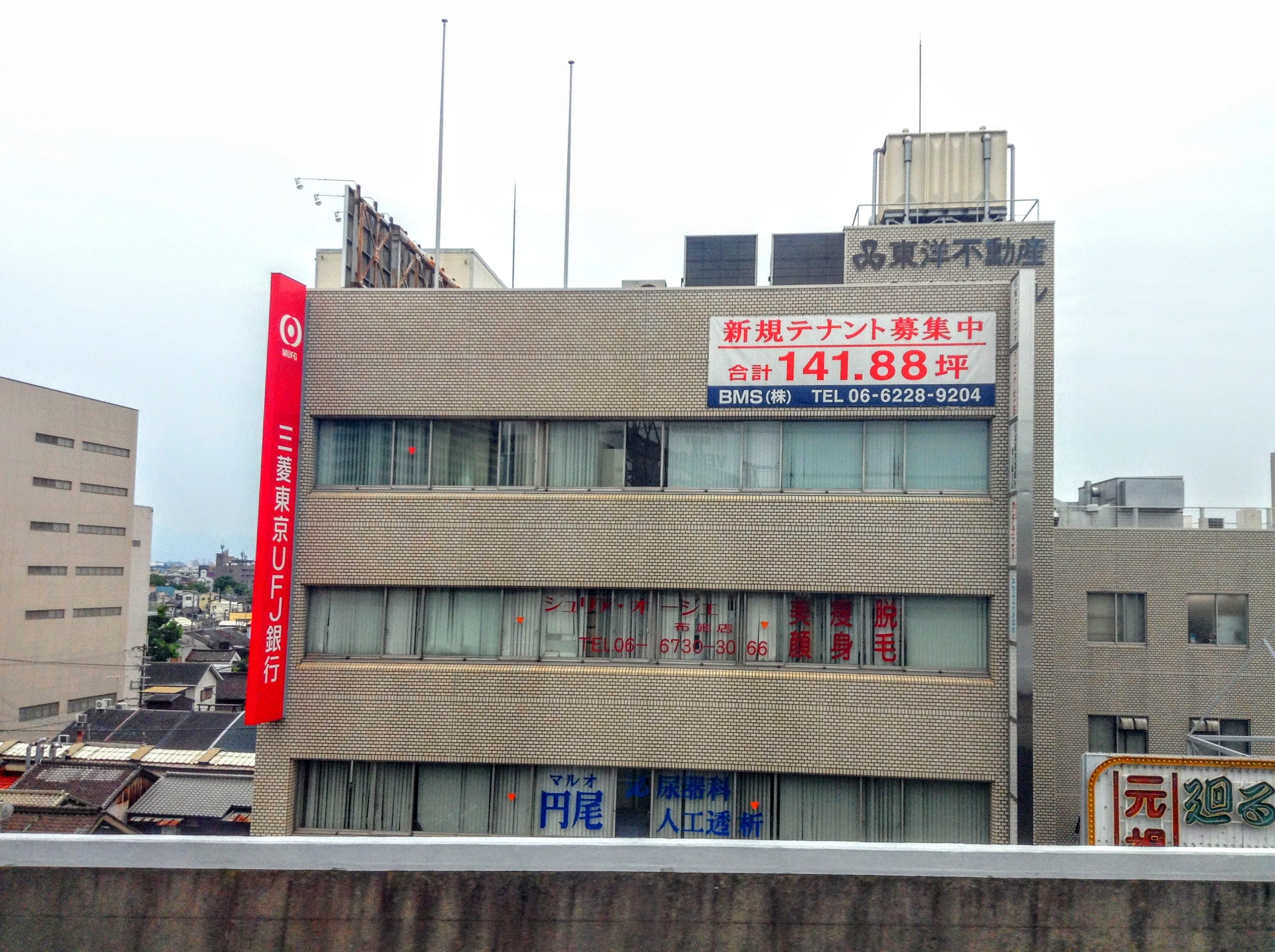 東大阪市の三和東洋ビルには三和銀行の社章が残されている